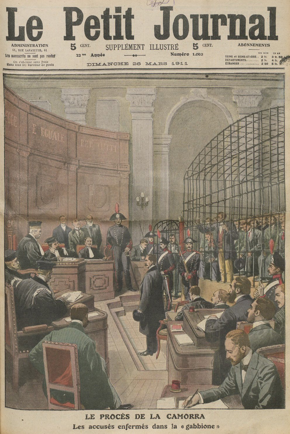 Procès Cuocolo contre la Camorra napolitaine en 1911: Une n° 1062 du Petit Journal du 26 mars 1911